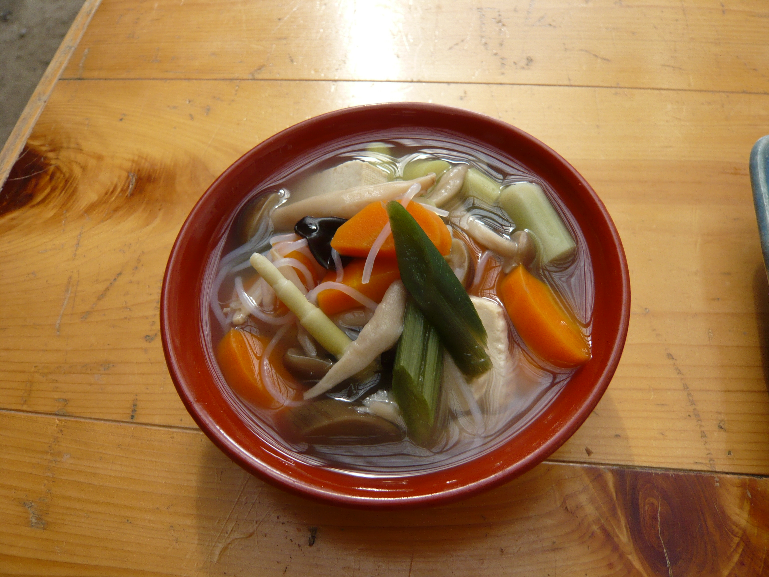 福島県の郷土料理、こづゆ。福島県大内宿にて撮影